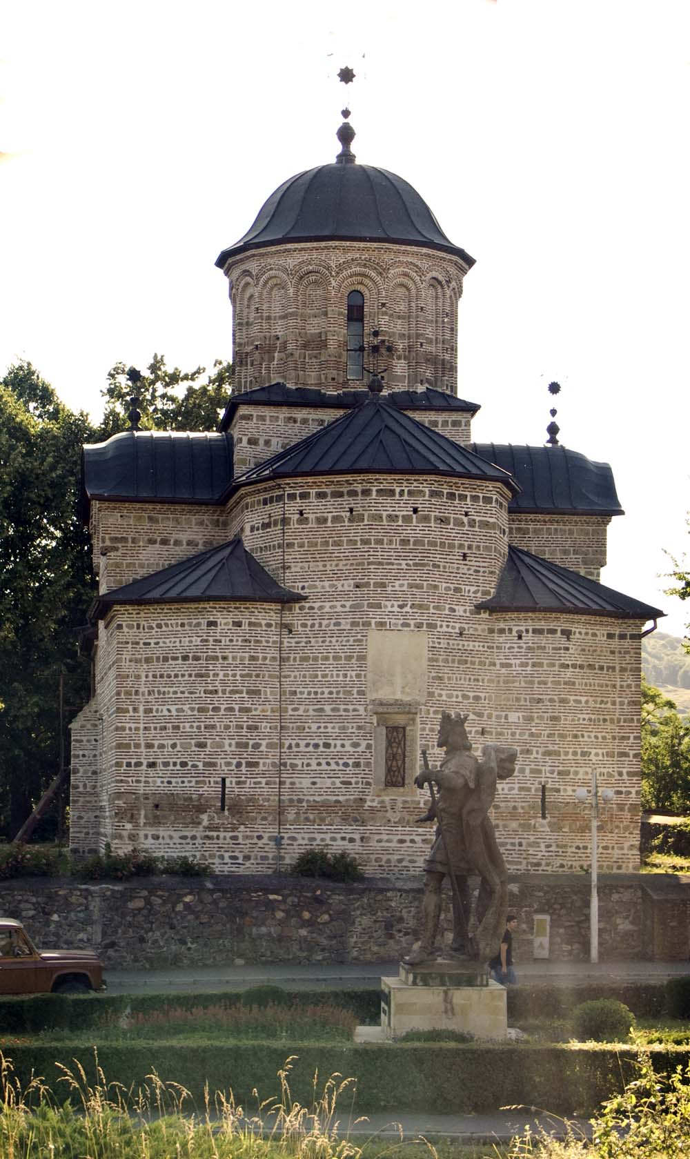 Curtea de Argeş, Biserica Domnească Sf. Nicolae. 01